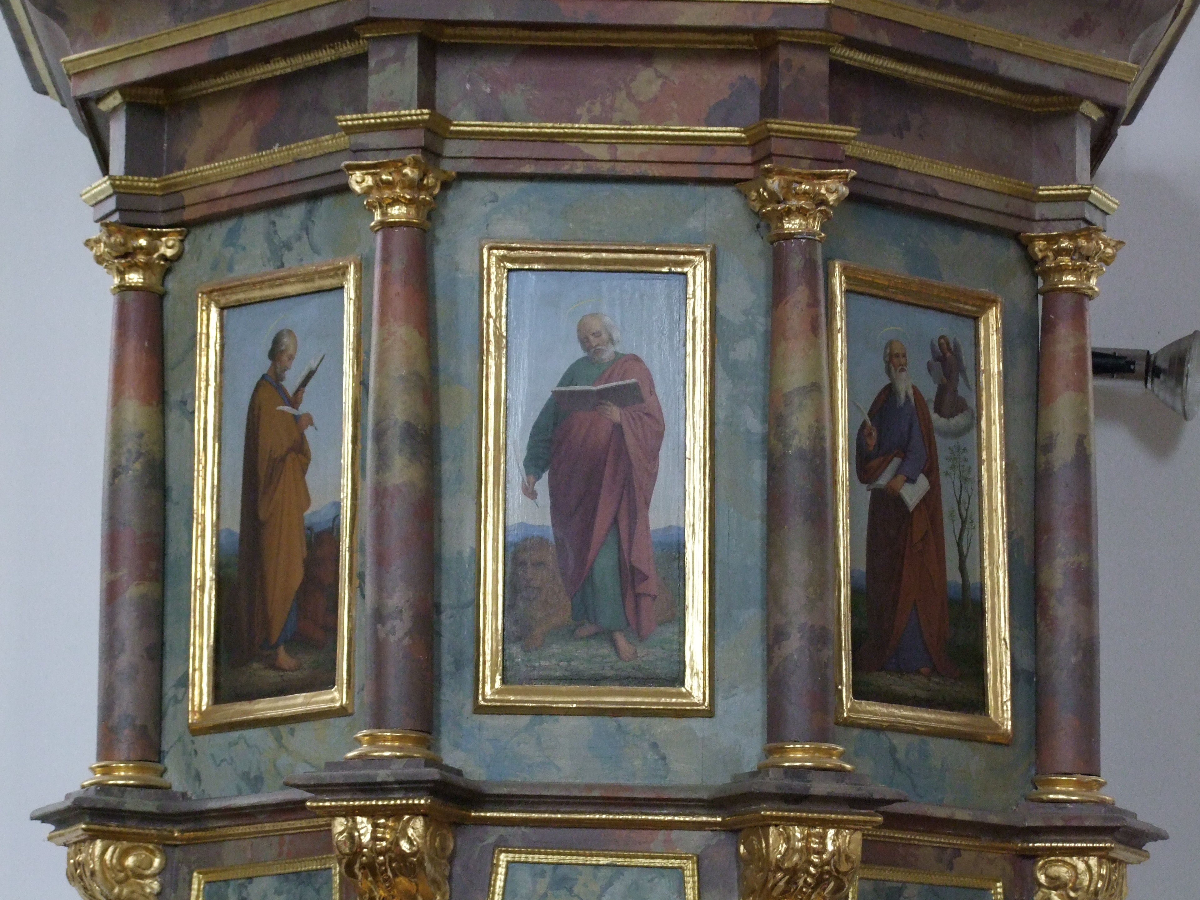 St. Jakobus der Ältere im oberschwäbischen Mindelau, einem Ortsteil der Stadt Mindelheim in Bayern/Schwaben